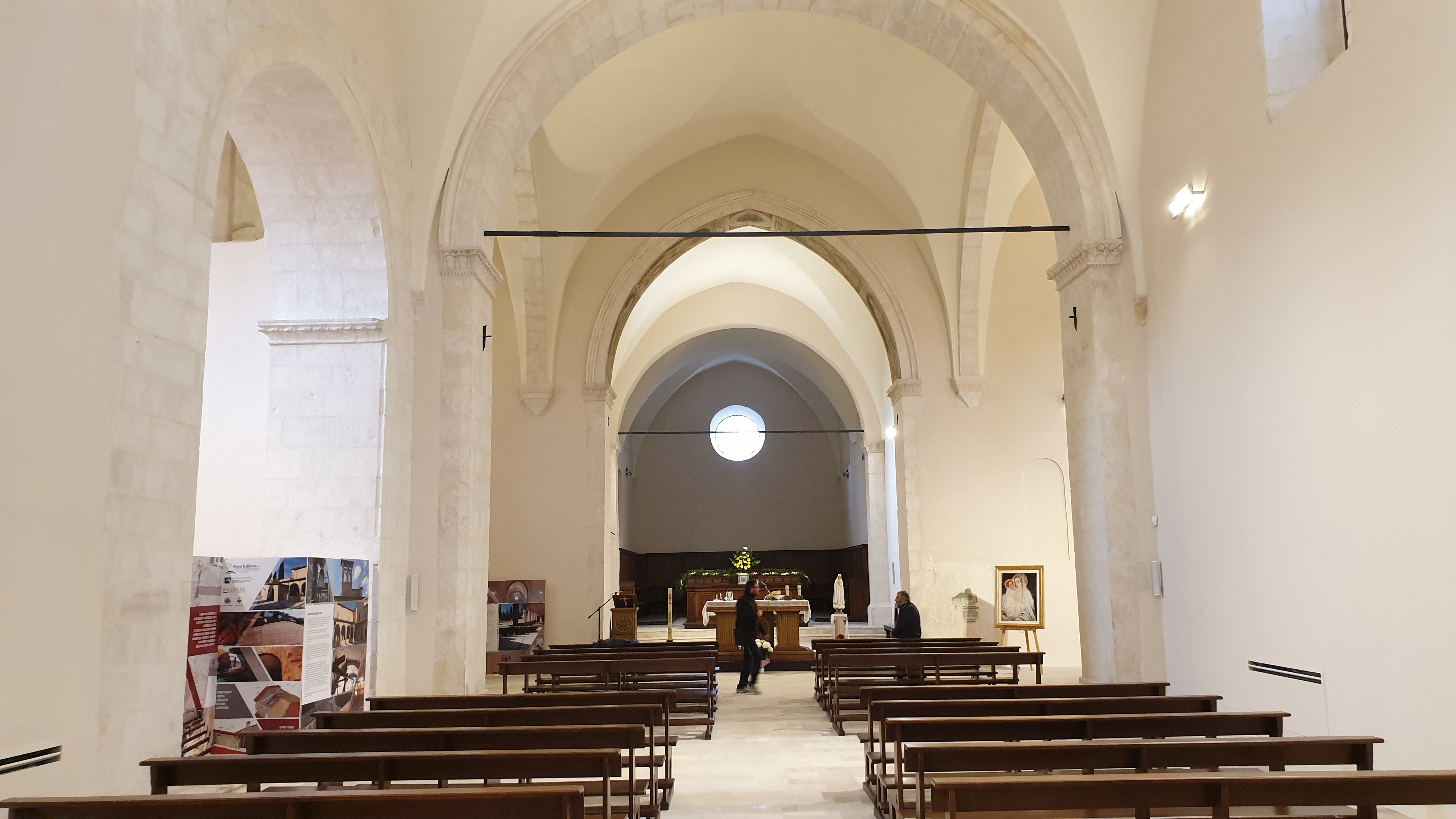 L'Aquila: chiesa di Santa Maria del Soccorso